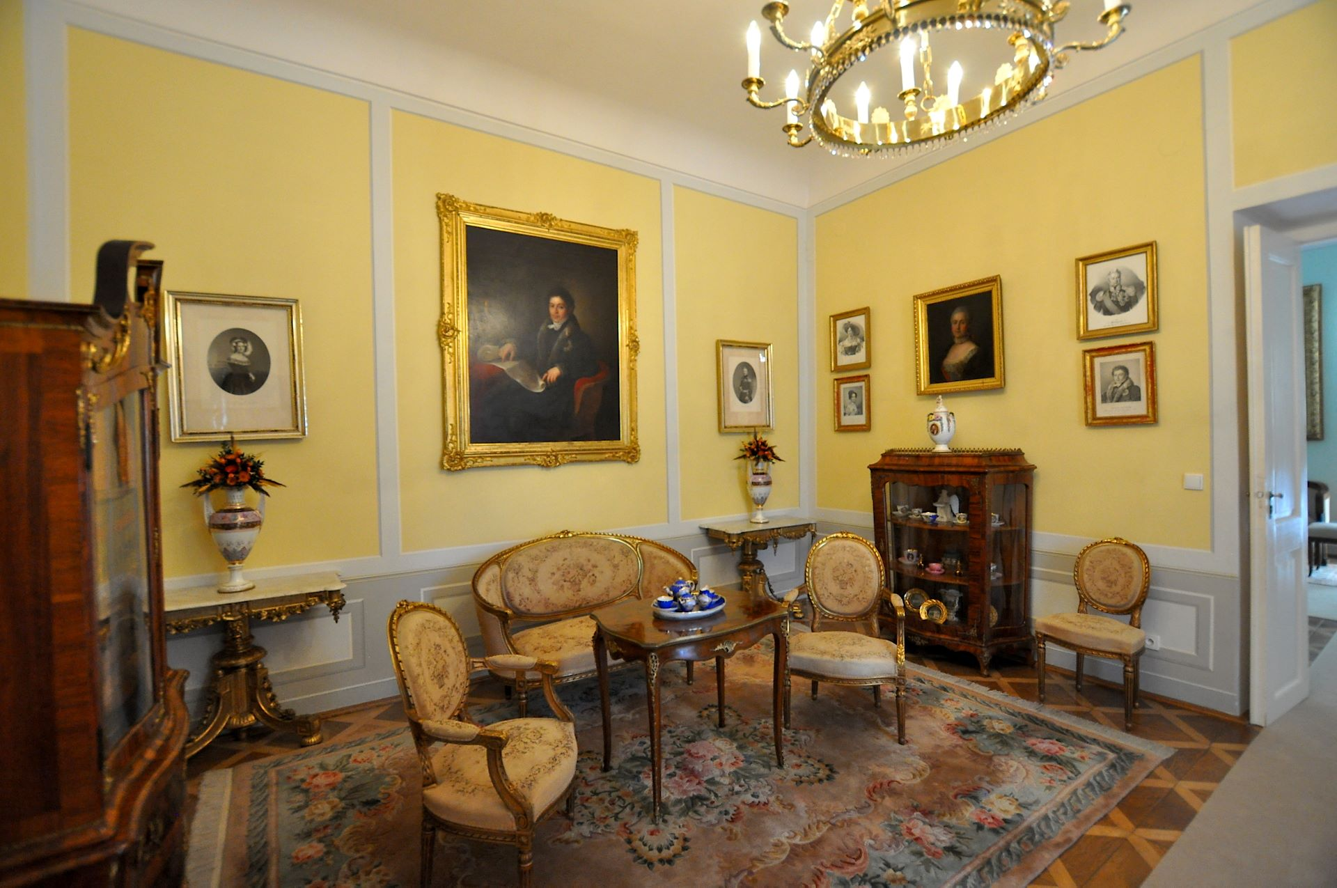 Schloss Ratibořice